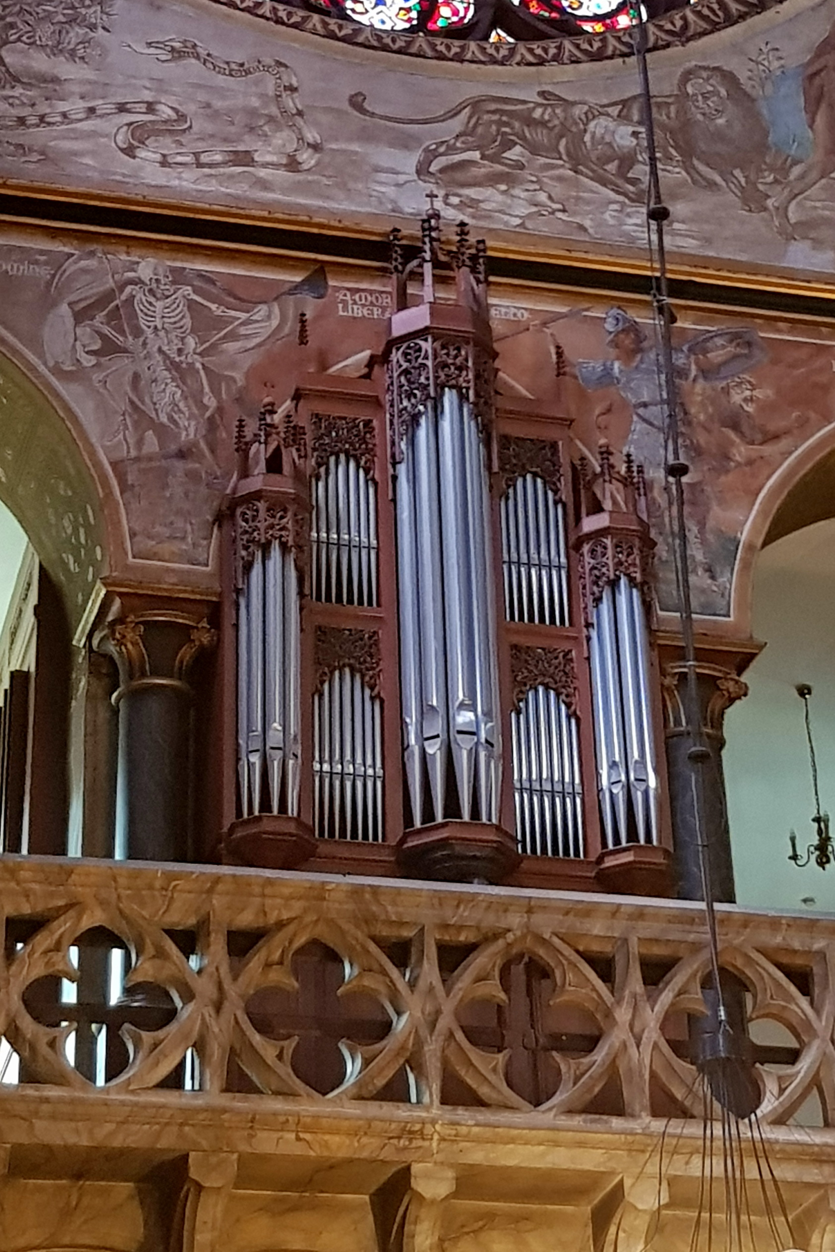 Fernwerk (ohne eigene Spielanlage) der Romanus-Seifert-Hauptorgel auf der nördlichen Querhausempore in der Basilika St. Marien in Kevelaer, Kapellenplatz 35. This image shows a heritage building in Germany, located in the North Rhine-Westphalian city Kevelaer (no. A 12).